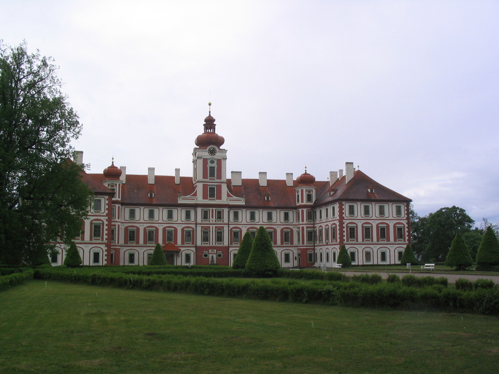 castel of mnichovo hradiště, czech republic